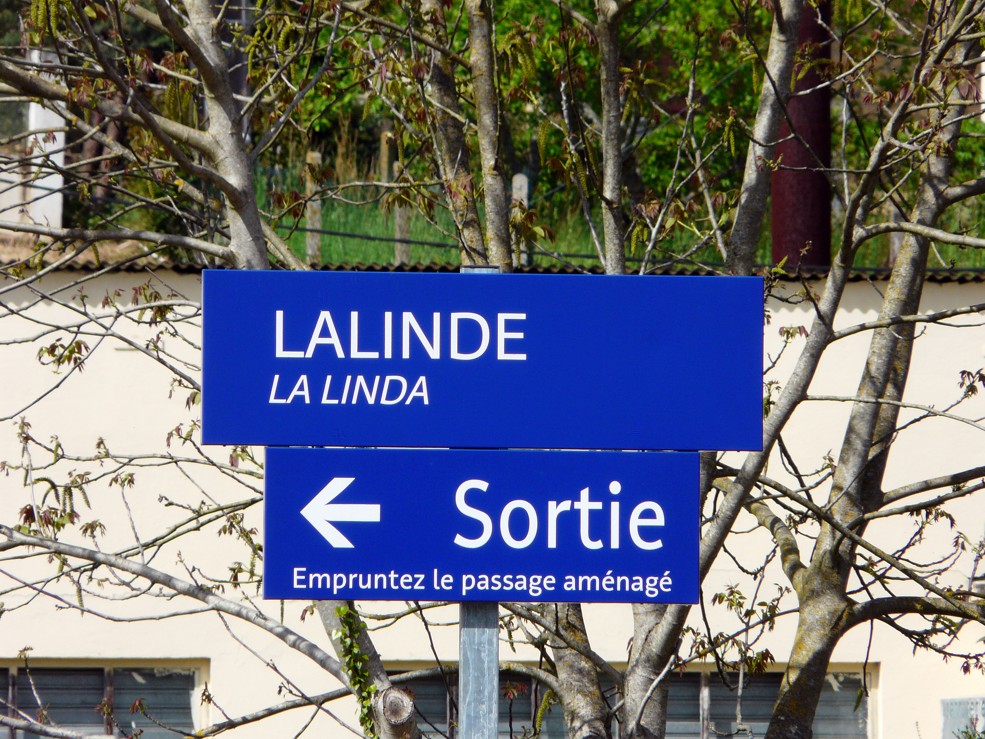 Panneau bilingue français-occitan en gare de Lalinde, Dordogne, France.